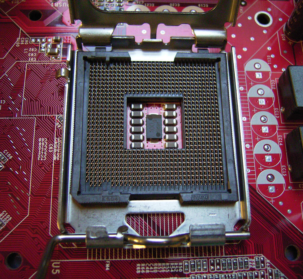 Sockel 775 für Intel-Prozessoren im LGA775-Gehäuse. Blick auf die Kontakte bei hochgeklapptem Haltedeckel (am oberen Bildrand teilweise sichtbar). In den Bildecken die Platinen-Bohrungen zur Kühlkörpermontage.